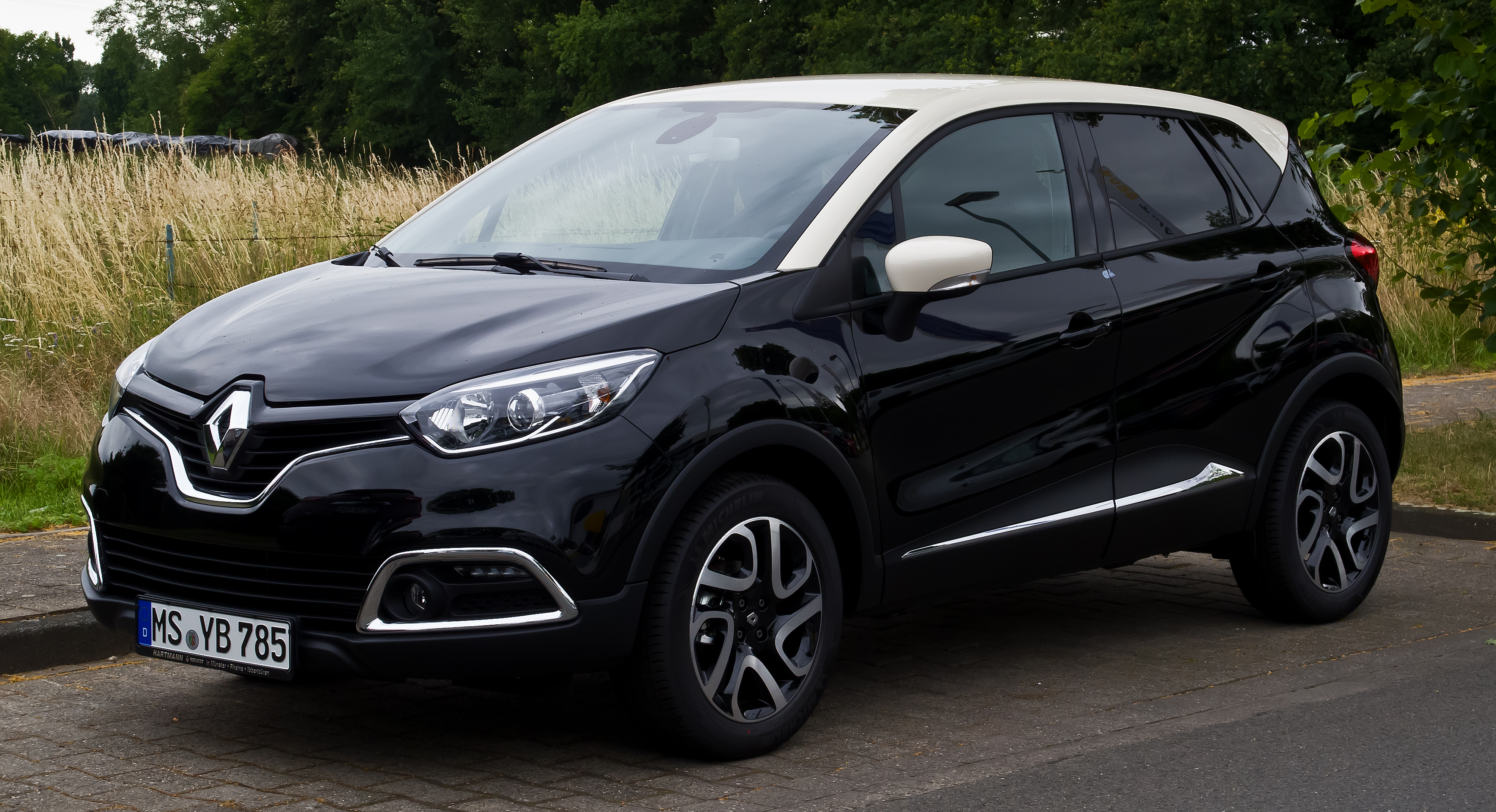 Renault Captur Luxe ENERGY TCe 90 Start & Stop eco²